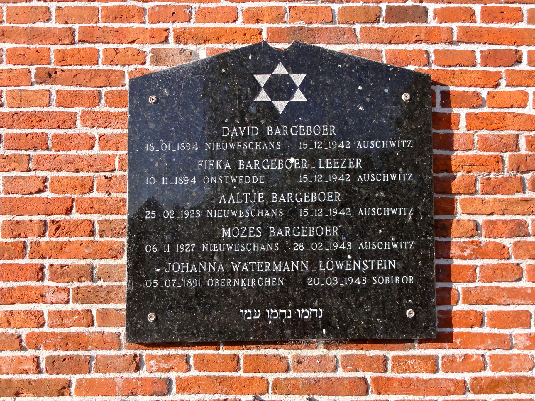 Joods gedenkteken bij de voormalige synagoge van Nieuweschans